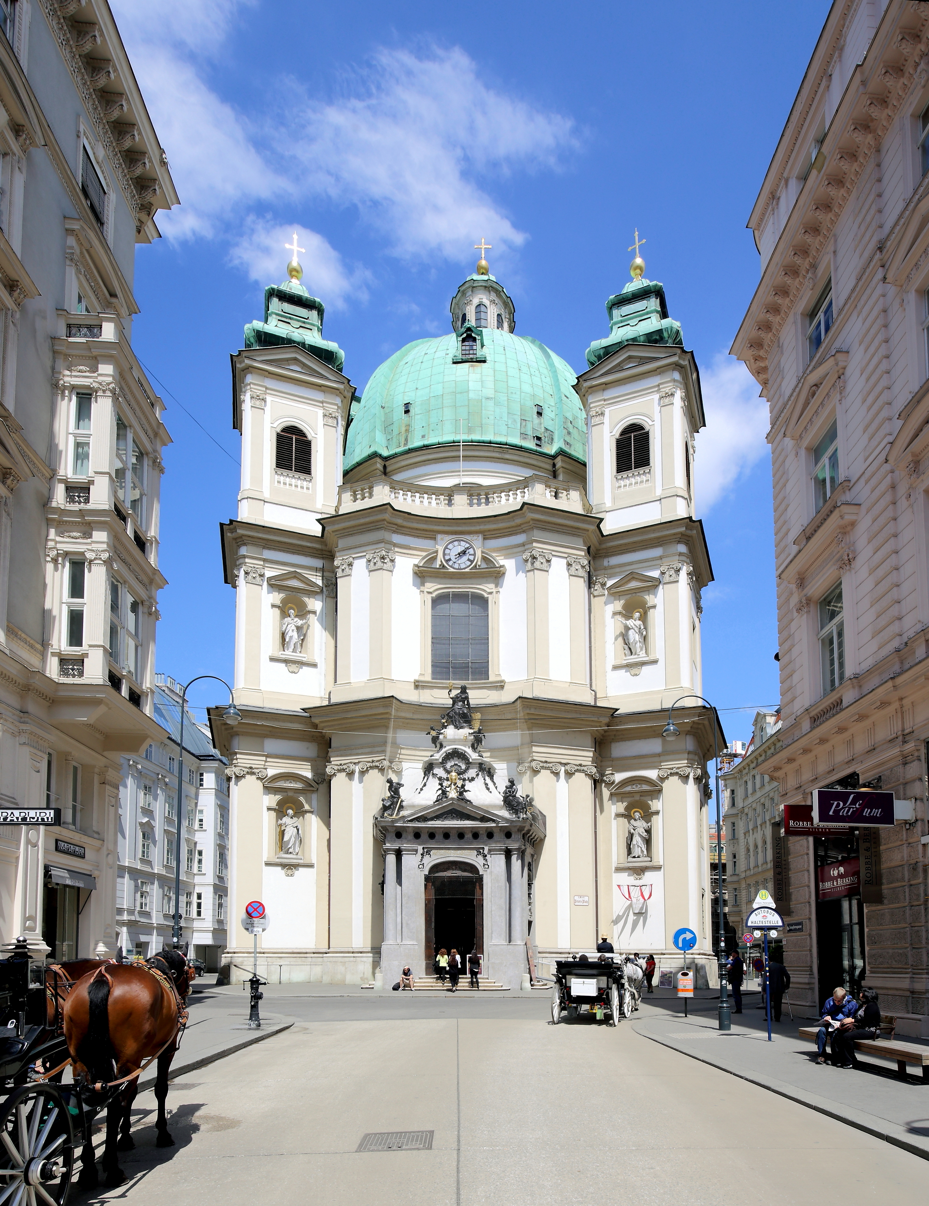 Hauptfassade bzw. Südwestansicht der Peterskirche im 1. Wiener Gemeindebezirk Innere Stadt. Der erste Kuppelbau des barocken Wien wurde ab 1701/02 errichtet. Die Planung und der Baubeginn (Fundamente) erfolgte unter Gabriele Montani. Nachdem dieser als Festungsarchitekt nach Madrid zog, setzte ab 1703 sehr wahrscheinlich Johann Lucas von Hildebrandt den Bau nach veränderten Plänen fort.